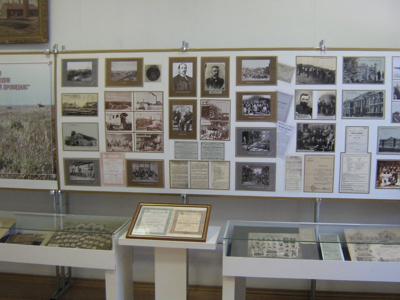 Музей ММК Ілліча